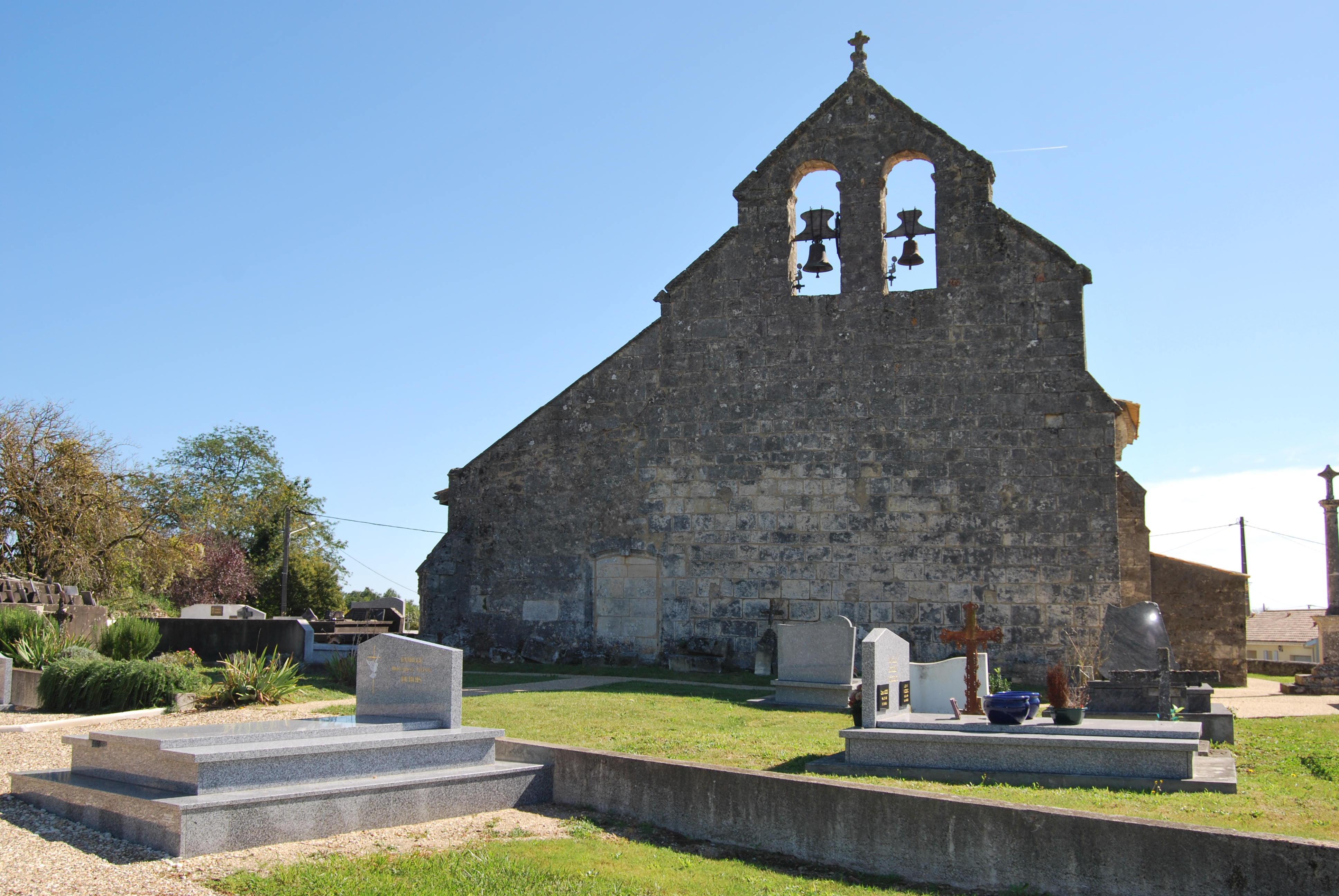 Église Saint-Fort de Mouillac .